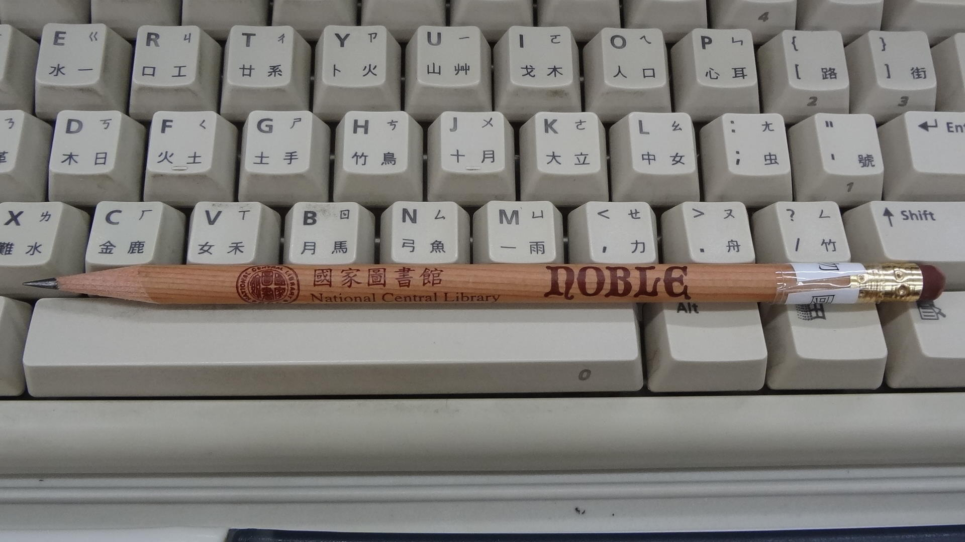 國家圖書館的公用鉛筆